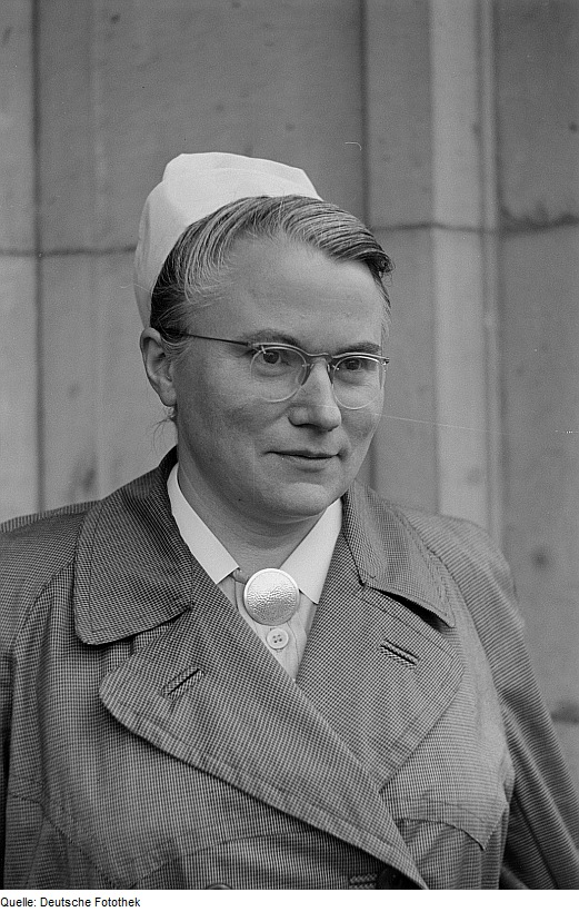 Original image description from the Deutsche Fotothek Porträt der Oberin Bönicke